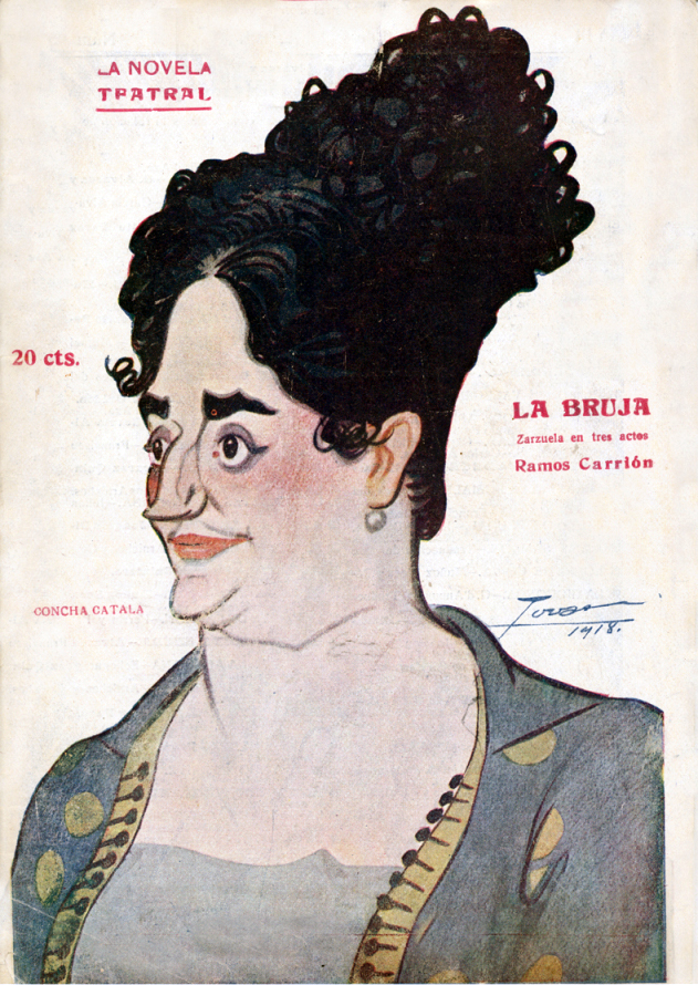 Caricatura de Concha Catalá.